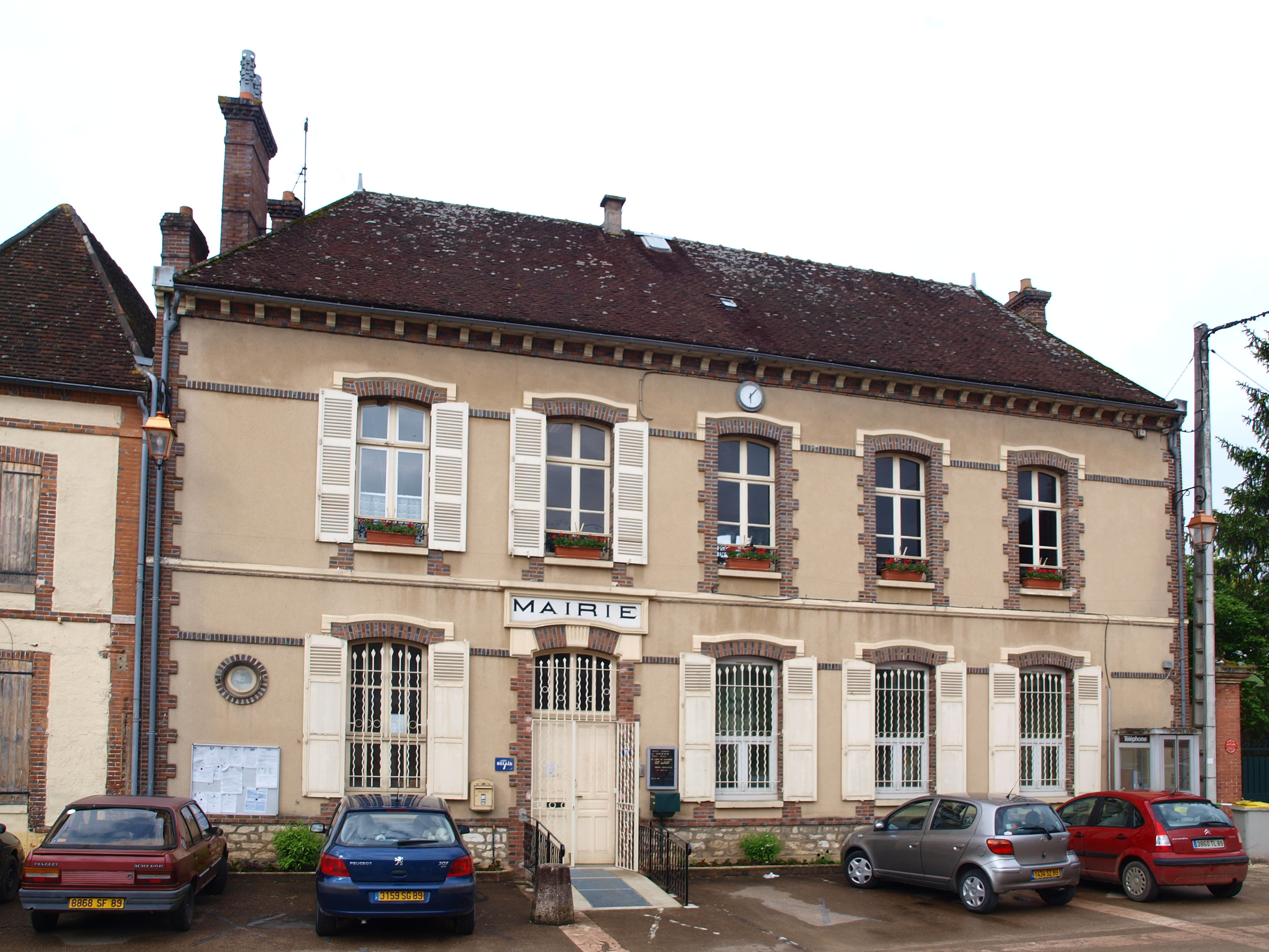 Armeau (Yonne, France)